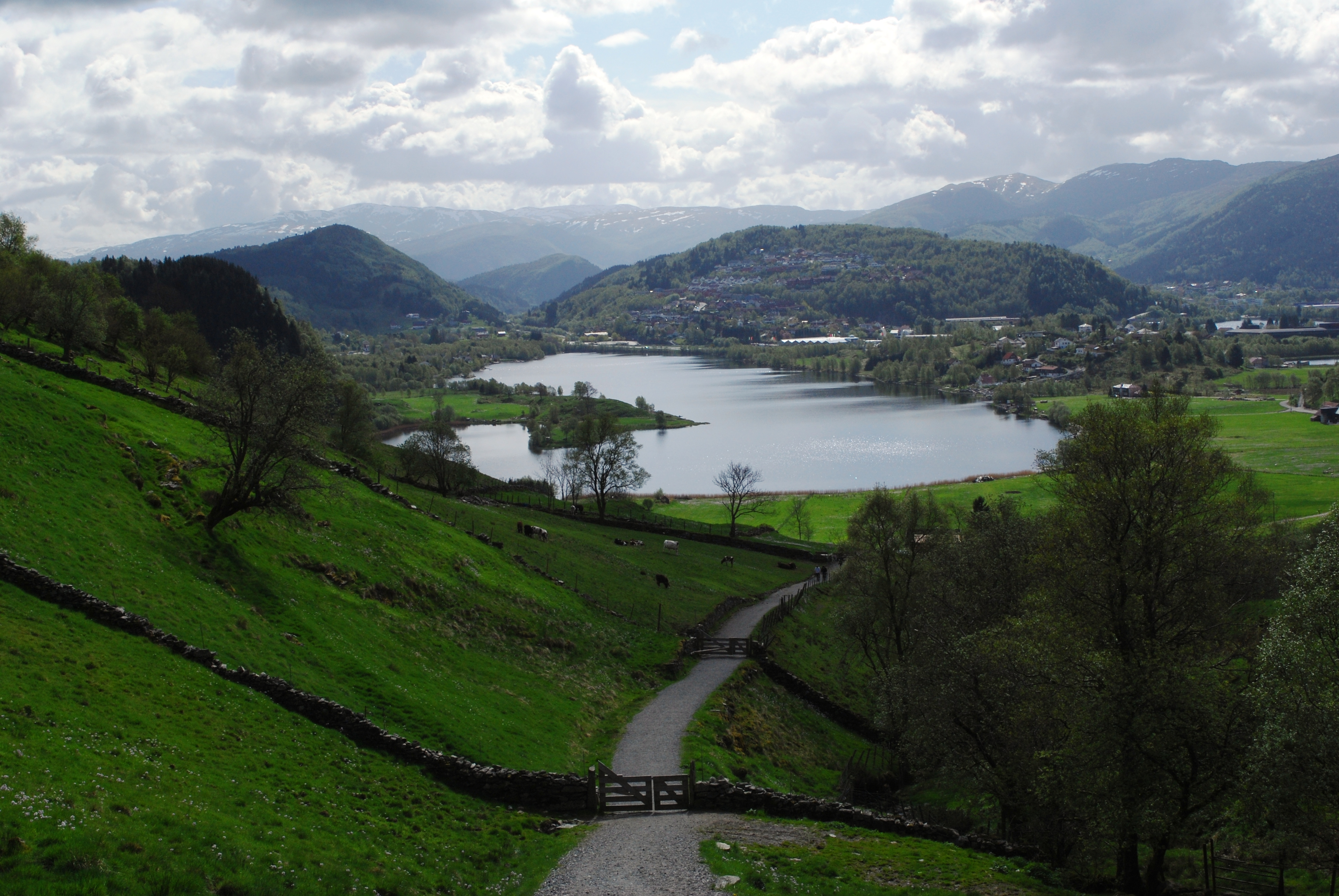 Description=Langavatnet i Åsane i Bergen midt i bildet, den Trondhjemske postvei midt i forgrunnen. Bak Langavatnet passerer E39 og E16 ved Vågsbotn. Den Trondhjemske postvei